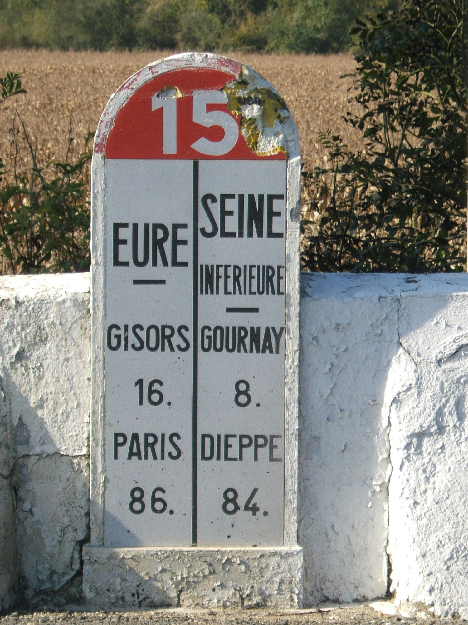 Borne interdépartementale sur la RN 15 entre l'Eure et la Seine-Inférieure / Milestone on the RN 15 between the Eure and the Seine-Inférieure départements